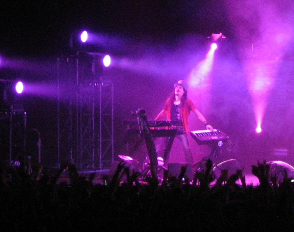 Tuomas Holopainen au Zénith de Paris, le 06 avril 2008.